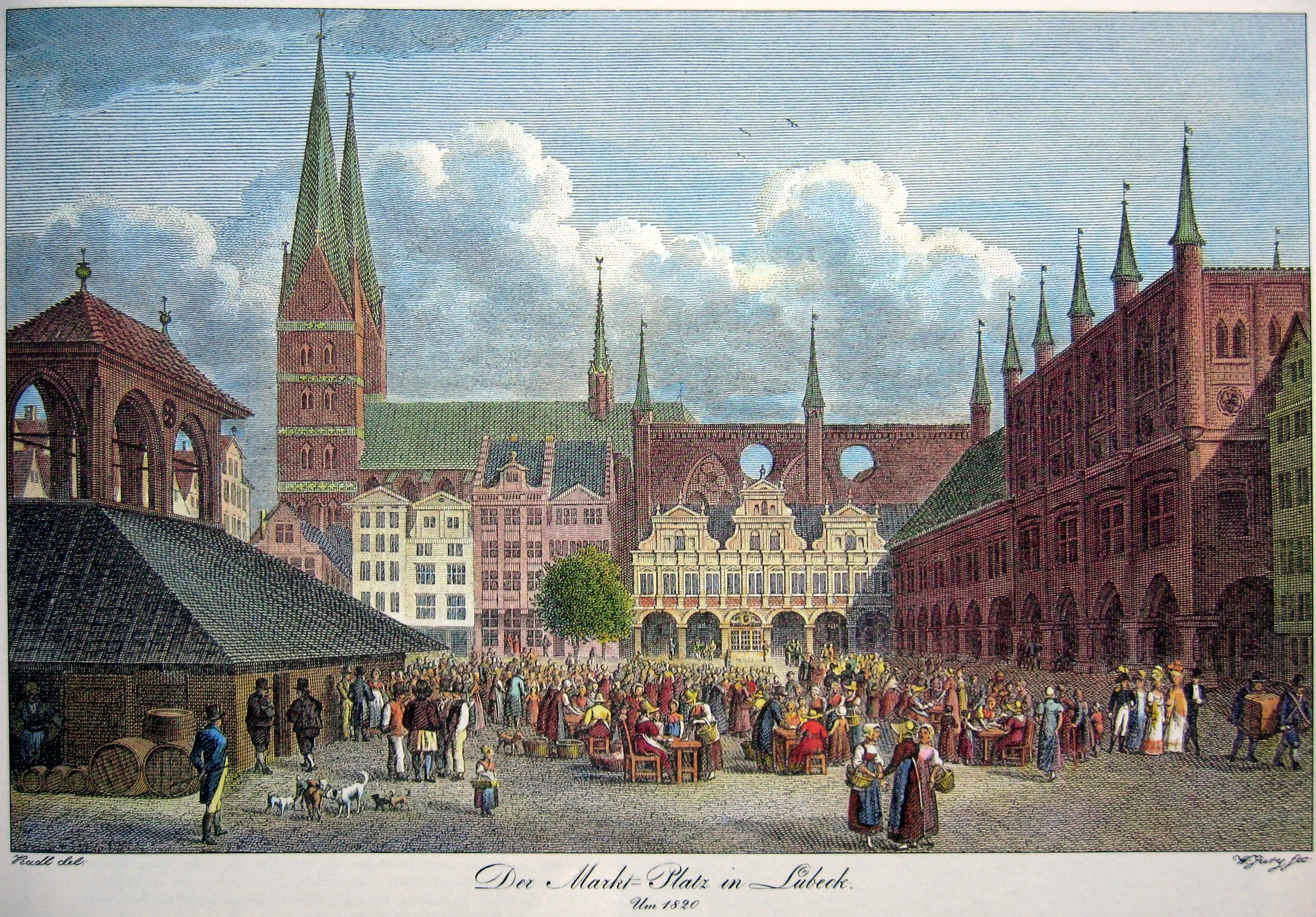 Der Markt (Lübeck) um 1820, im Hintergrund links die Marienkirche (Lübeck), das Lübecker Rathaus, links der Kaak (Lübeck)